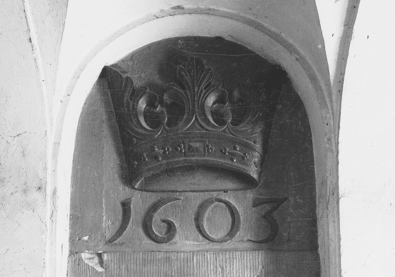 Stentavla "Krona 1603" som fanns på Våghuset vid Järntorget